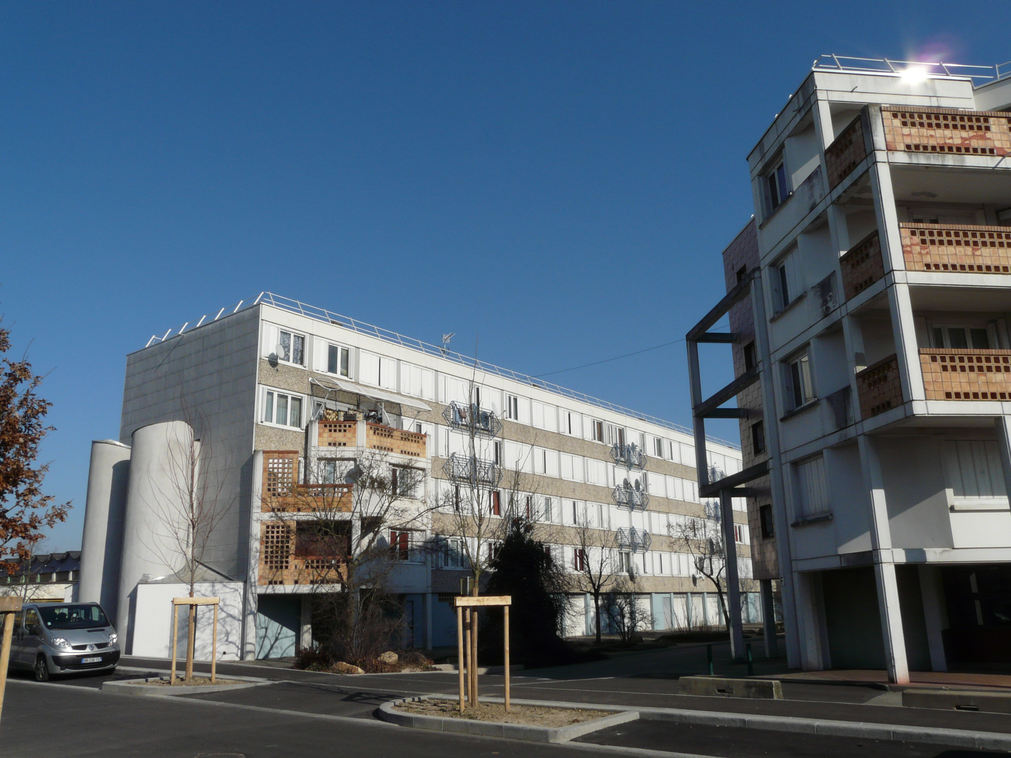 Immeubles d'habitation dans le quartier de la Grappinière à Vaux-en-Velin